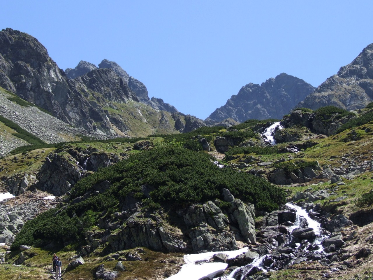 Litworowy Potok w Dolinie Litworowej (górne piętro Doliny Białej Wody w Tatrach Wysokich=